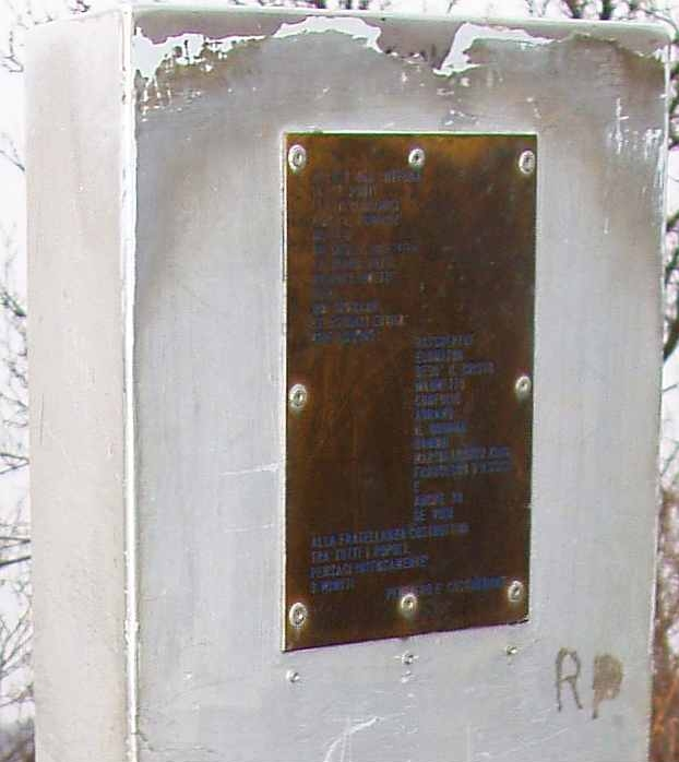 L'iscrizione sul pilastrino in vetta al Musinè nel marzo 2006 This is a photography of Natura 2000 protected area with ID IT1110081